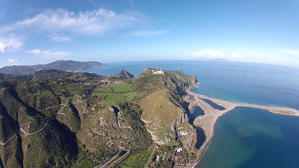 Panorama Laghetti di Marinello e Tindari